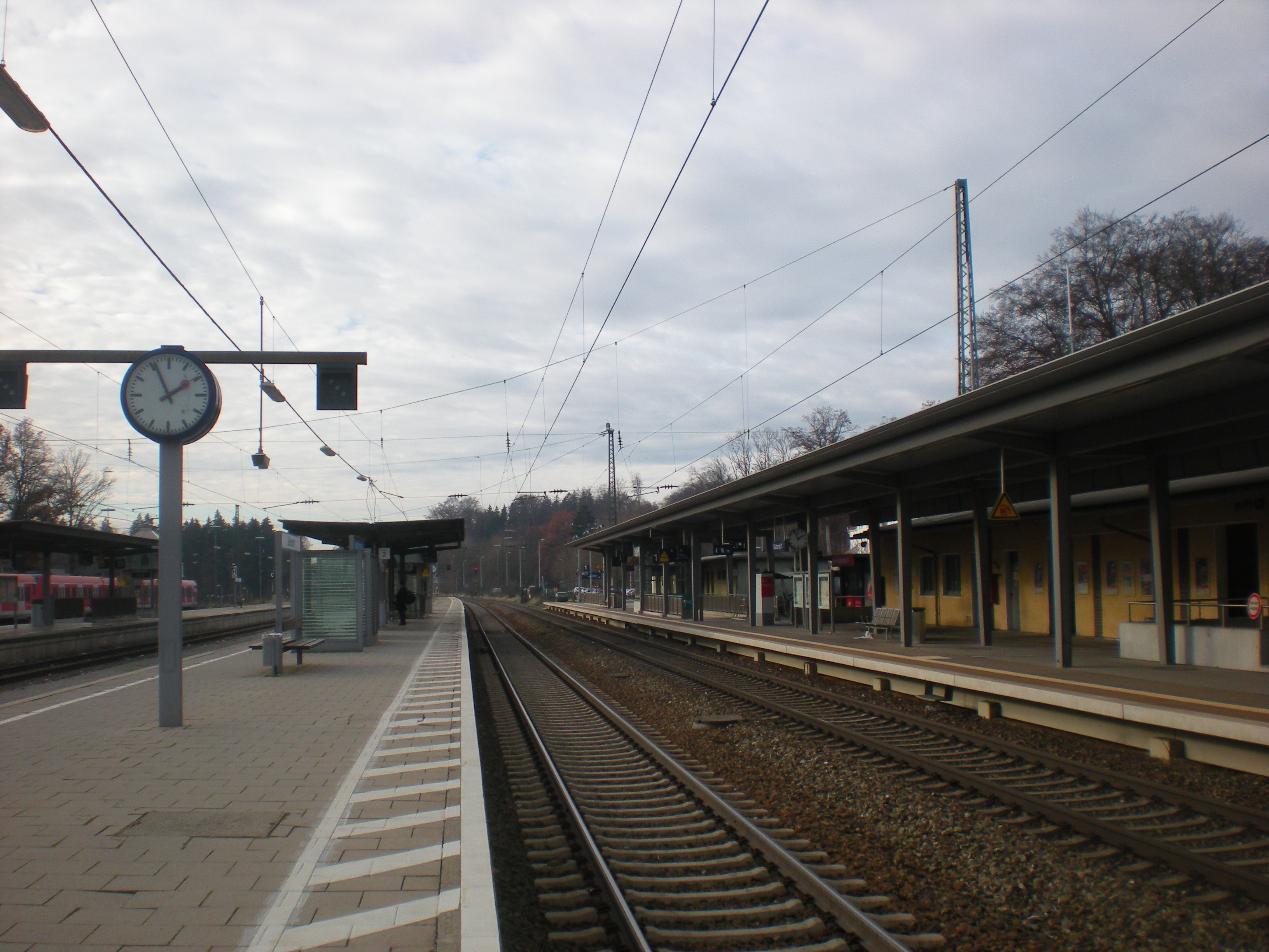 Bahnsteige des Bahnhofs Geltendorf